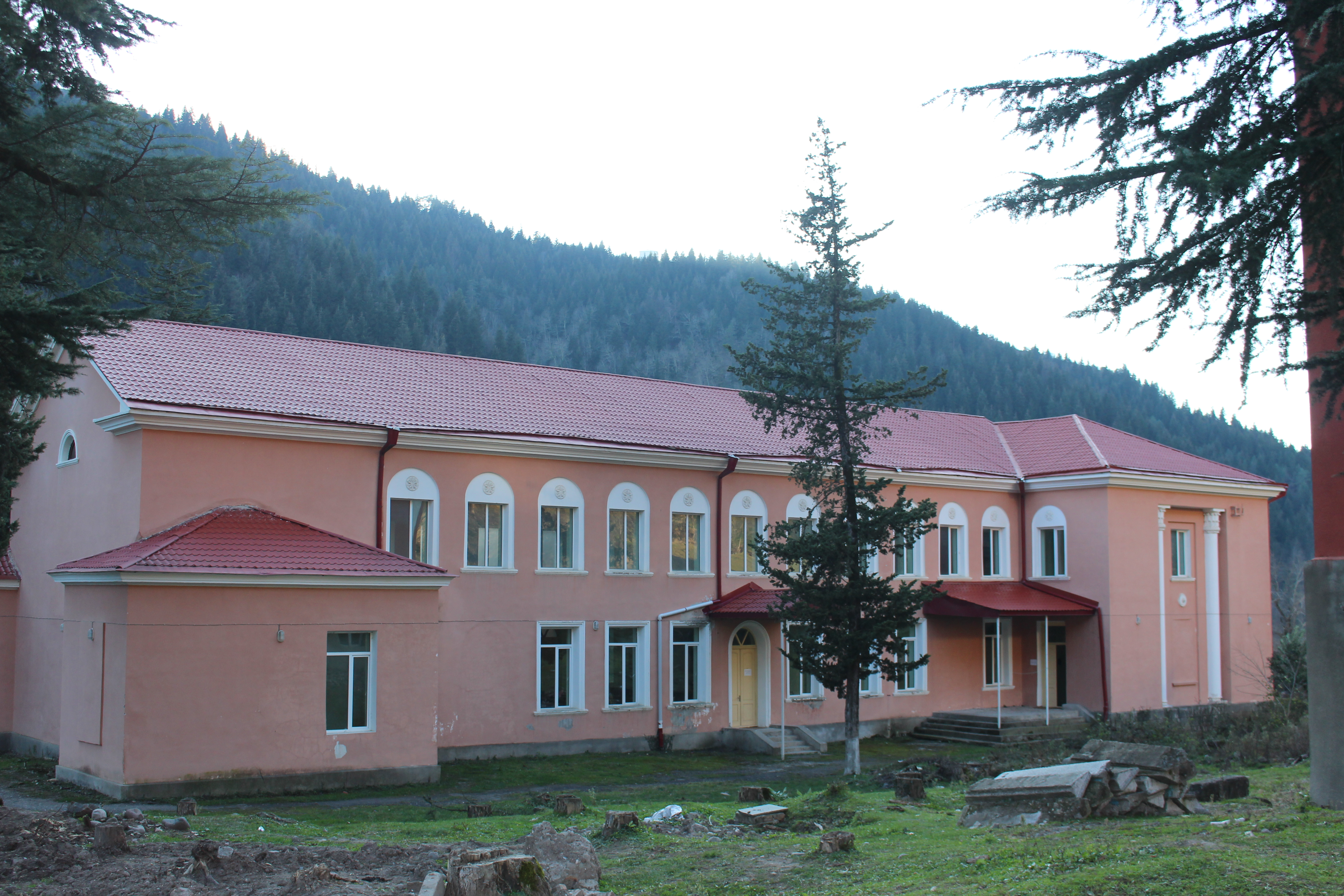 საპატრიარქოს წმიდა ტბელის სახელობის უნივერსიტეტის ბიბლიოთეკა